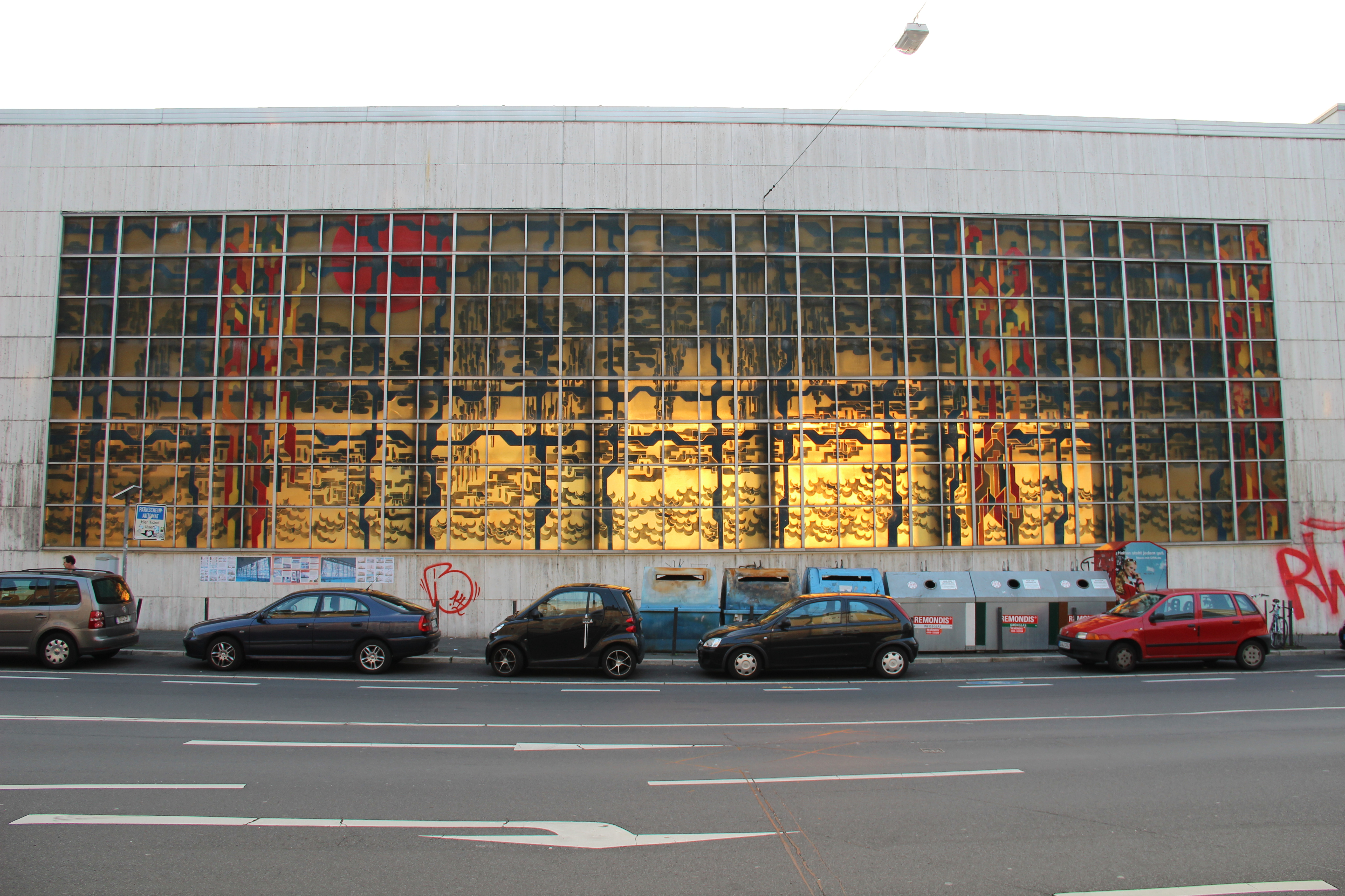 Fassade mit Kunstharzfenster, ehemaliges Viktoriabad, Franziskanerstraße 9/Belderberg, Bonn-Zentrum